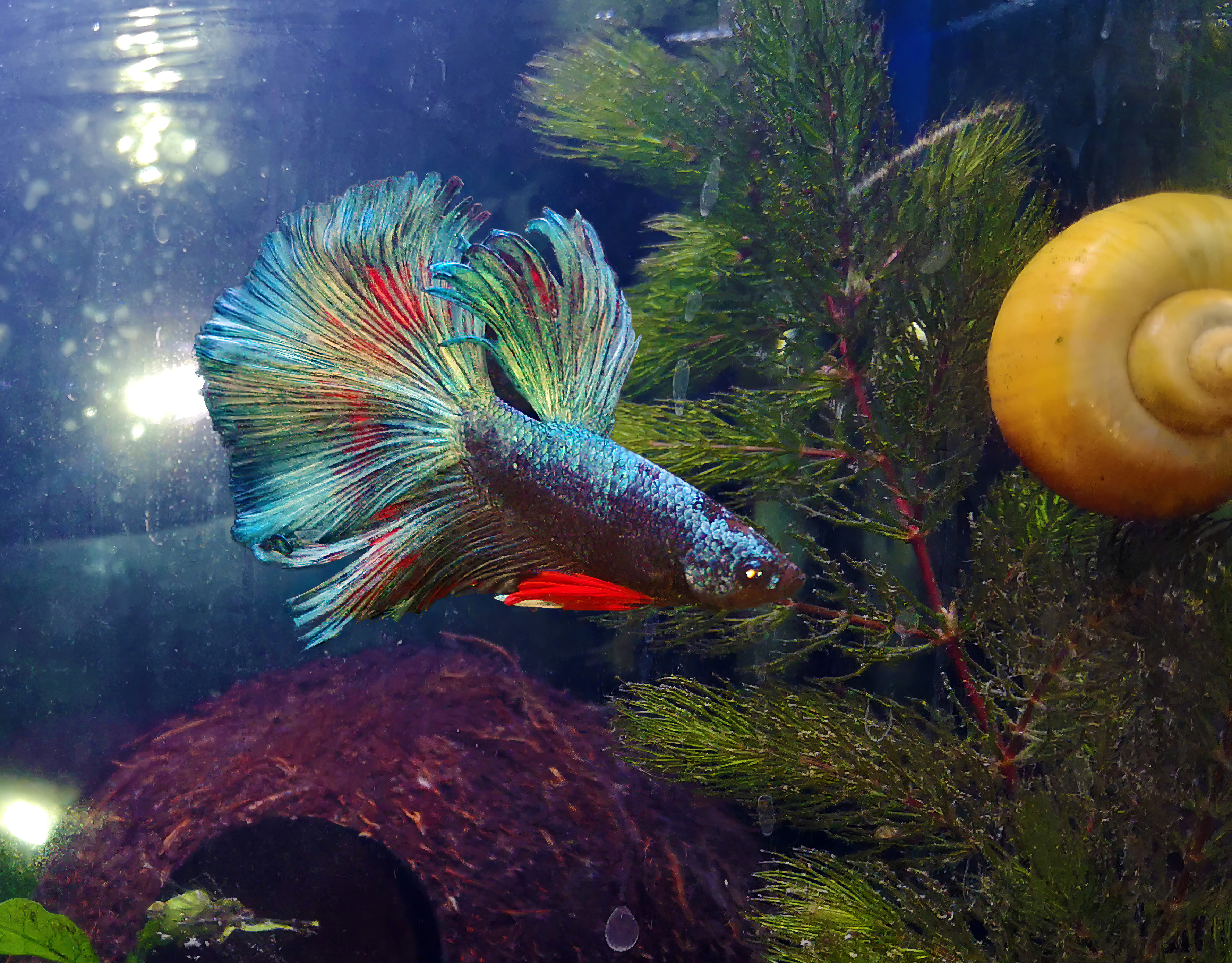 Фото рыбки петушка в аквариуме.